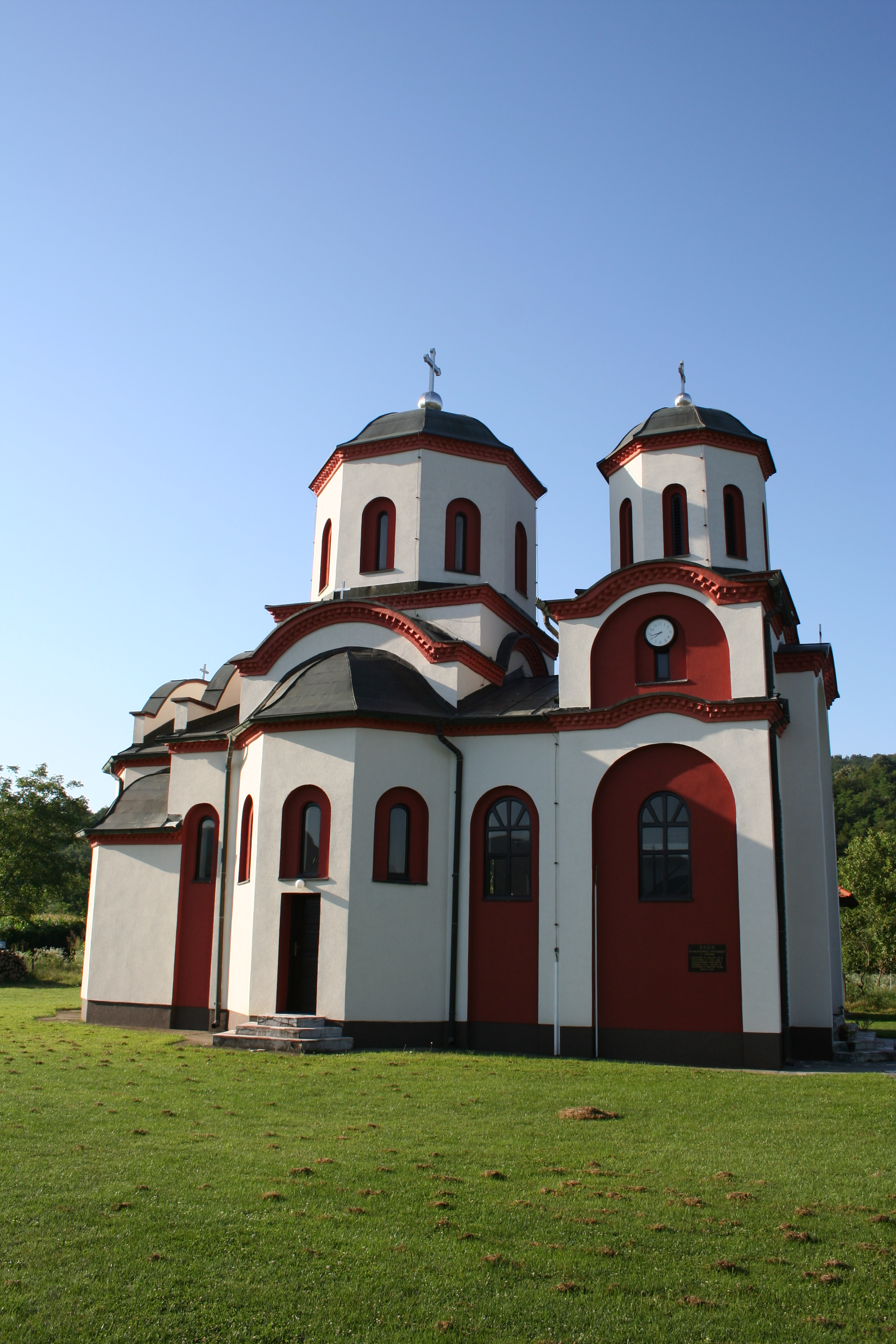 Crkva Vaskrsenja Gospodnjeg, Joševa